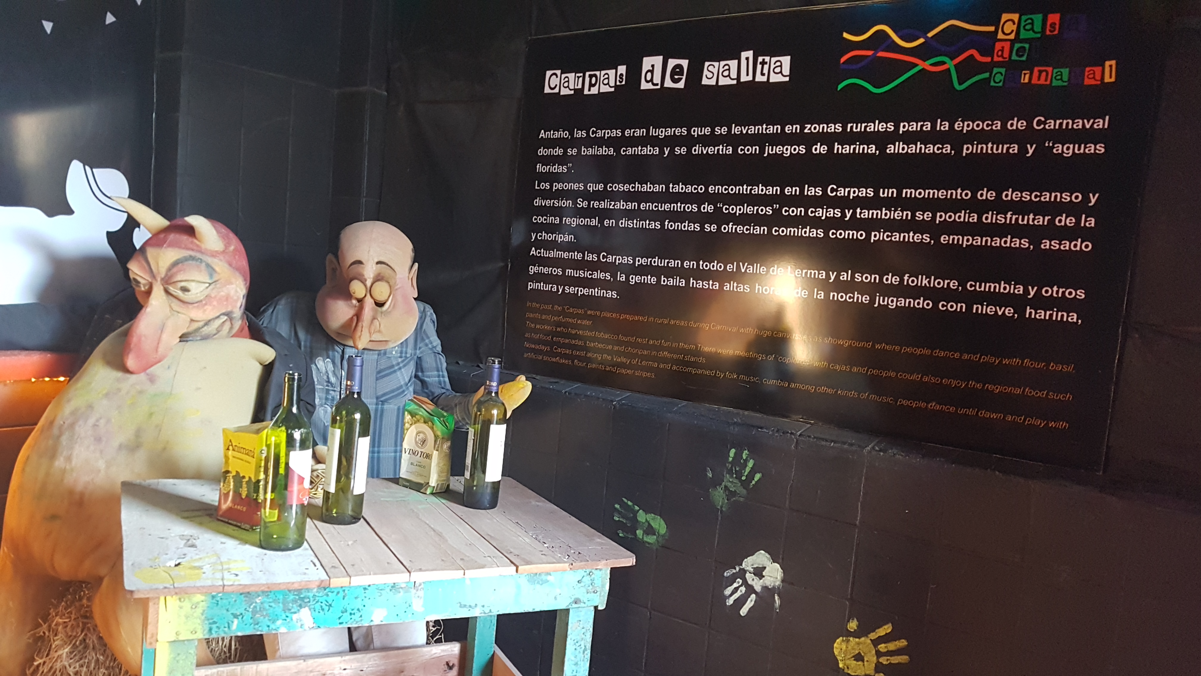 En la sala de Carpas de Salta, se expone en imágenes y personajes como se vive el carnaval de antaño, que vestimentas usan las personas, como es su forma de divertirse, los géneros musicales que escuchan y bailan y como se divierten jugando con serpentina, talco perfumado, nieve, harina, pinturas y el rico e infaltable aroma del albahaca detrás de la oreja.objetos